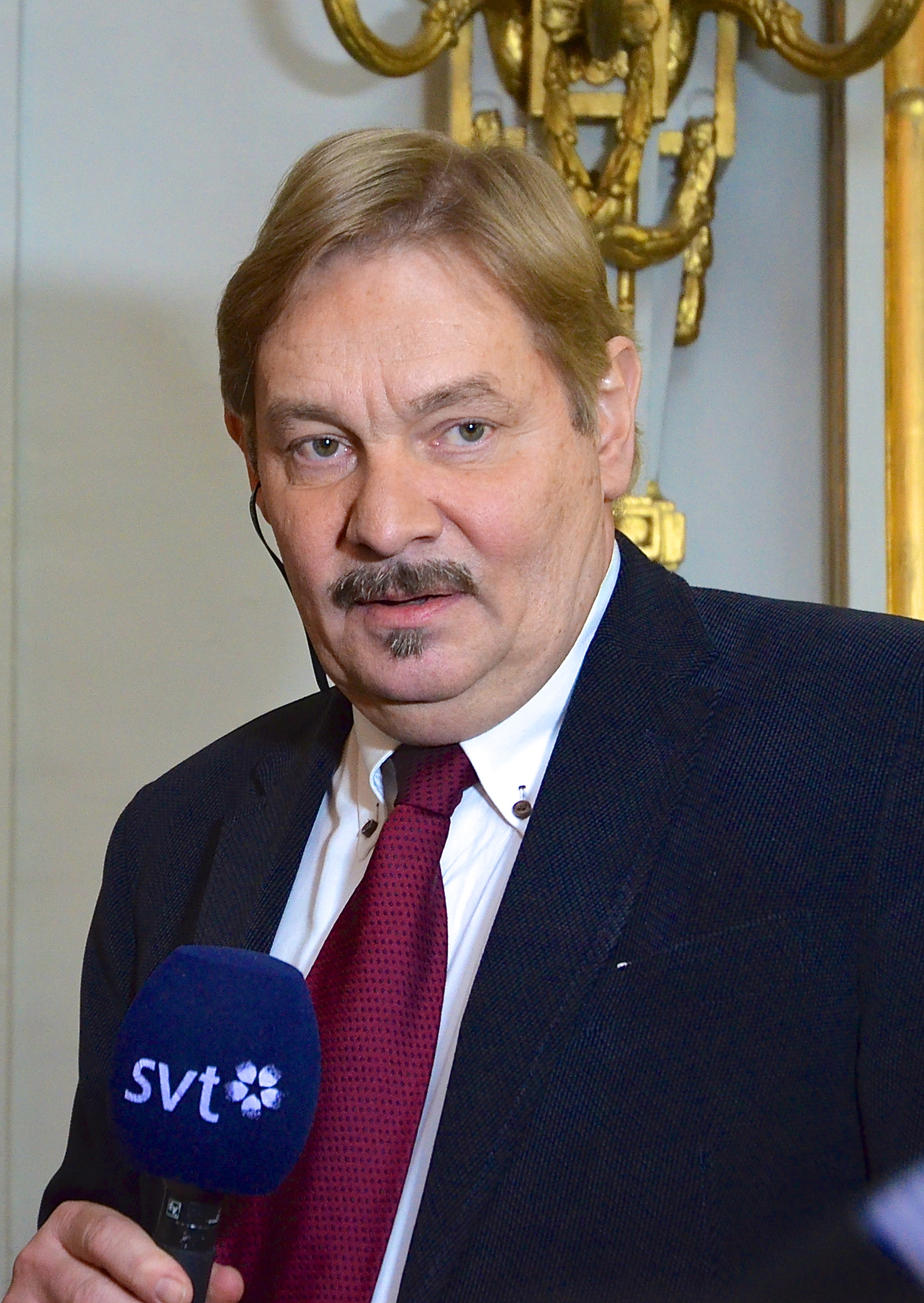 Göran Ågren, journalist, på Svenska Akademiens tillkännagivande av Nobelpriset i litteratur 2012.